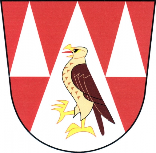 Znak, Jestřebí, okres Šumperk